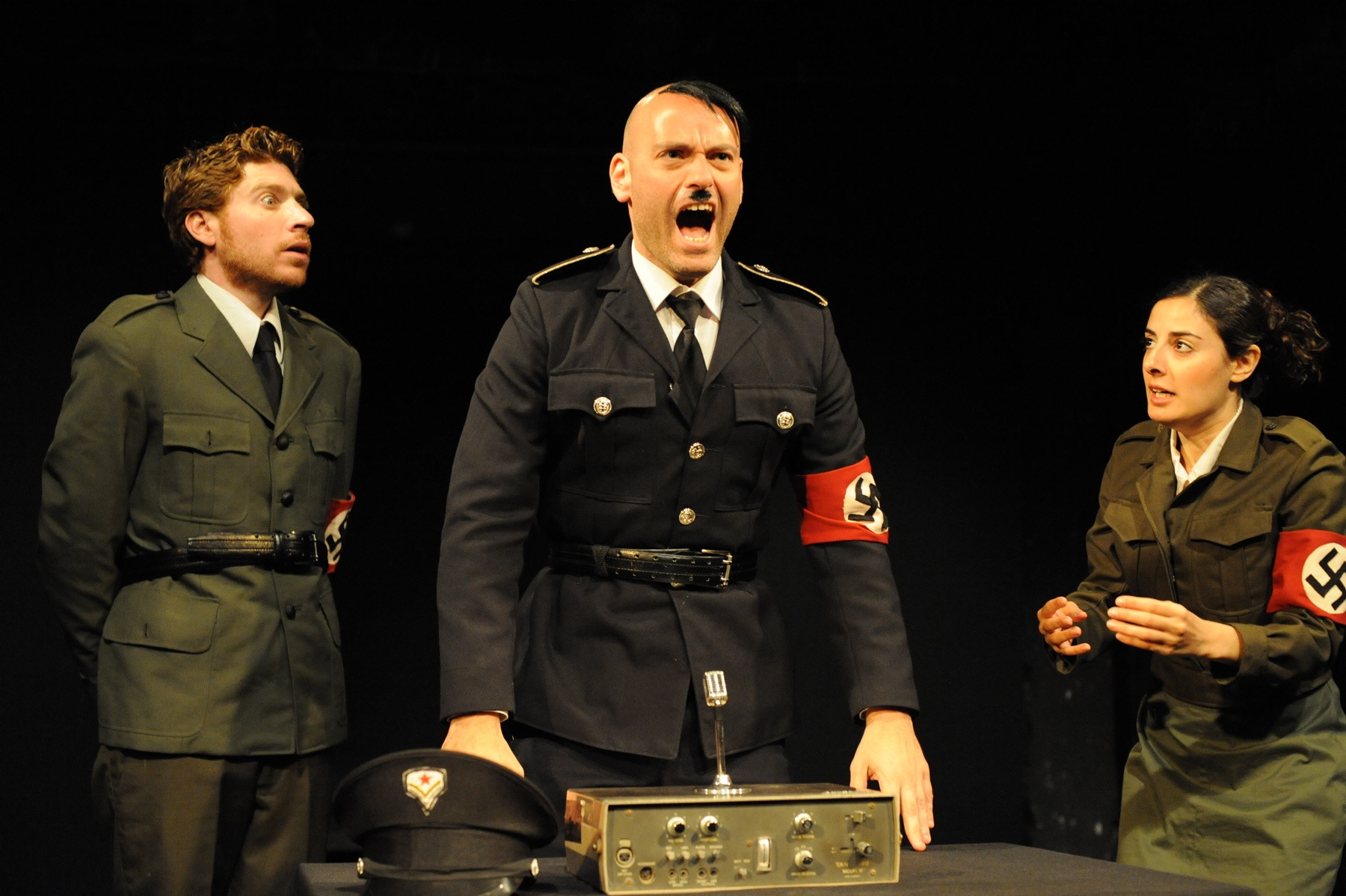 החברים של ננה, תיאטרון תמונע